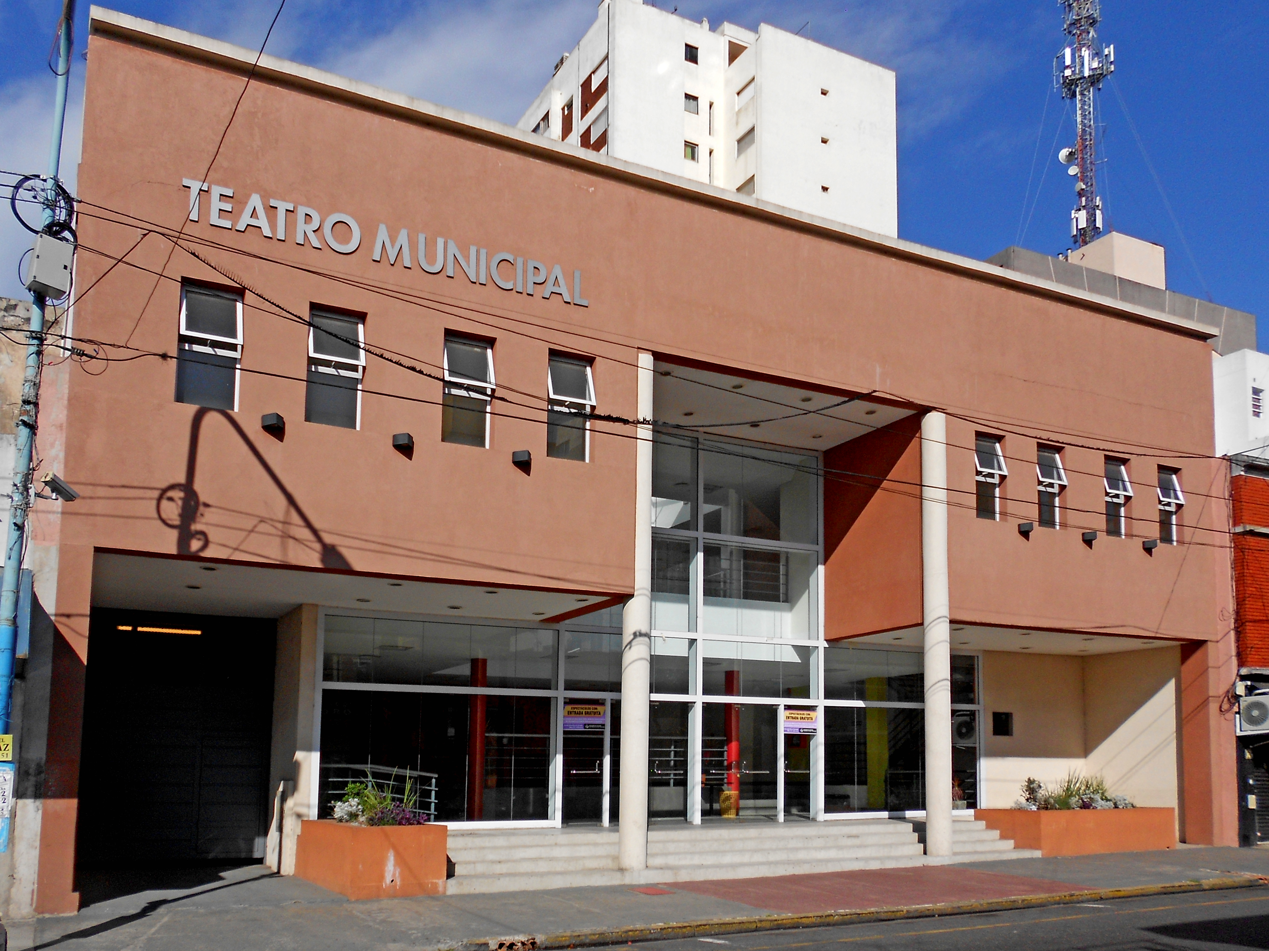 Teatro Municipal de Quilmes, inaugurado en el 2013.